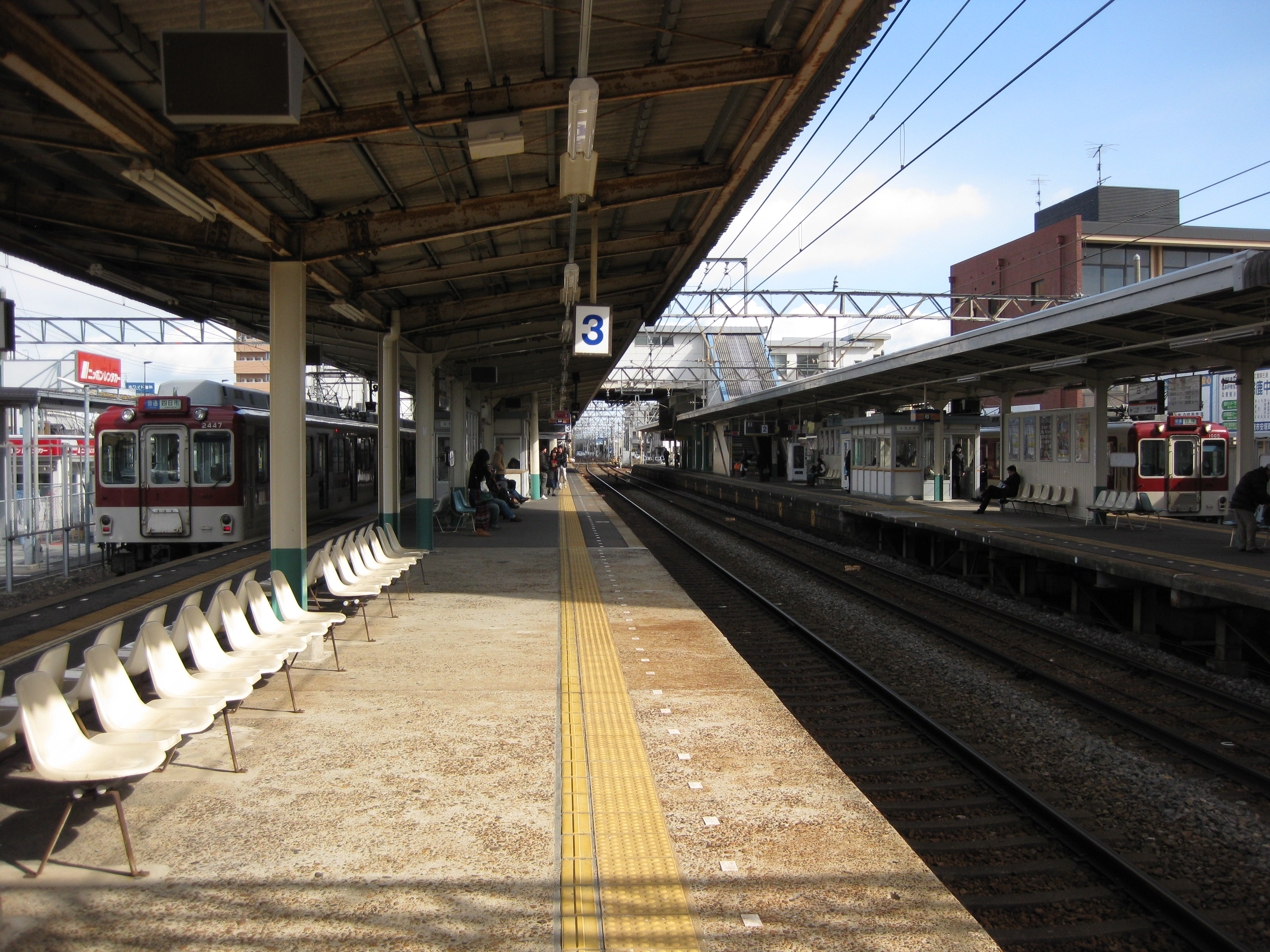 白子駅プラットホーム